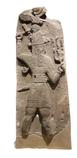 Stèle représentant le dieu Terhunza. Basalte. Tell Ahmar, ancienne Til Barsib (en araméen) ou Masuwari (en hittite), dans l'actuelle Syrie. 950-850 avant J.-C. Fouilles F. Thureau-Dangin et A. Barrois. Paris, Musée du Louvre, AO 11505. Exposée au Musée du Louvre en 2019 pour l'exposition "Royaumes oubliés, de l'empire hittite aux Araméens". Légende dans l'exposition "Royaumes oubliés" : "Les deux fragments de cette stèle ont été retrouvés dans la partie ouest du site par des villageois en 1928. La stèle avait été réemployée dans une architecture antique tardive. La stèle est décorée d'un relief sur la face avant et une inscription couvre les trois autres faces. Le relief de la face principale montre le dieu de l'orage sous un disque solaire ailé. L'iconographie montre une combinaison d'éléments hérités de différentes traditions : égyptienne, syrienne, hittite et mésopotamienne. L'inscription, en langue et hiéroglyphes louvites, fut rédigée par Hamiyara, le quatrième roi de la dynastie du royaume de Masuwari. Il s'y présente comme le serviteur du dieu Tarhunza et évoque également les dieux mésopotamiens Sîn et Ea, ou encore la déesse hittite de la fécondité Kubaba, figure tutélaire de Karkemish. La suite du texte évoque la stèle elle-même que le roi destinait à être placée "parmi les dieux", ce qui signifie qu'elle devait être destinée à un temple." J'ai modifié ma photographie de la stèle afin de la détourer pour enlever l'arrière-plan.